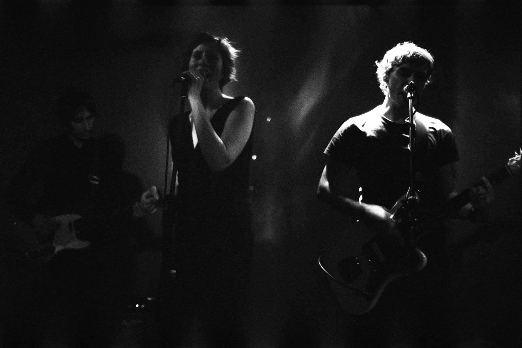 Bang Bang Club / Berlin / October 21st 2009